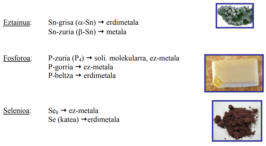 Elementuaren forma alotropikoaren araberako sailkapena